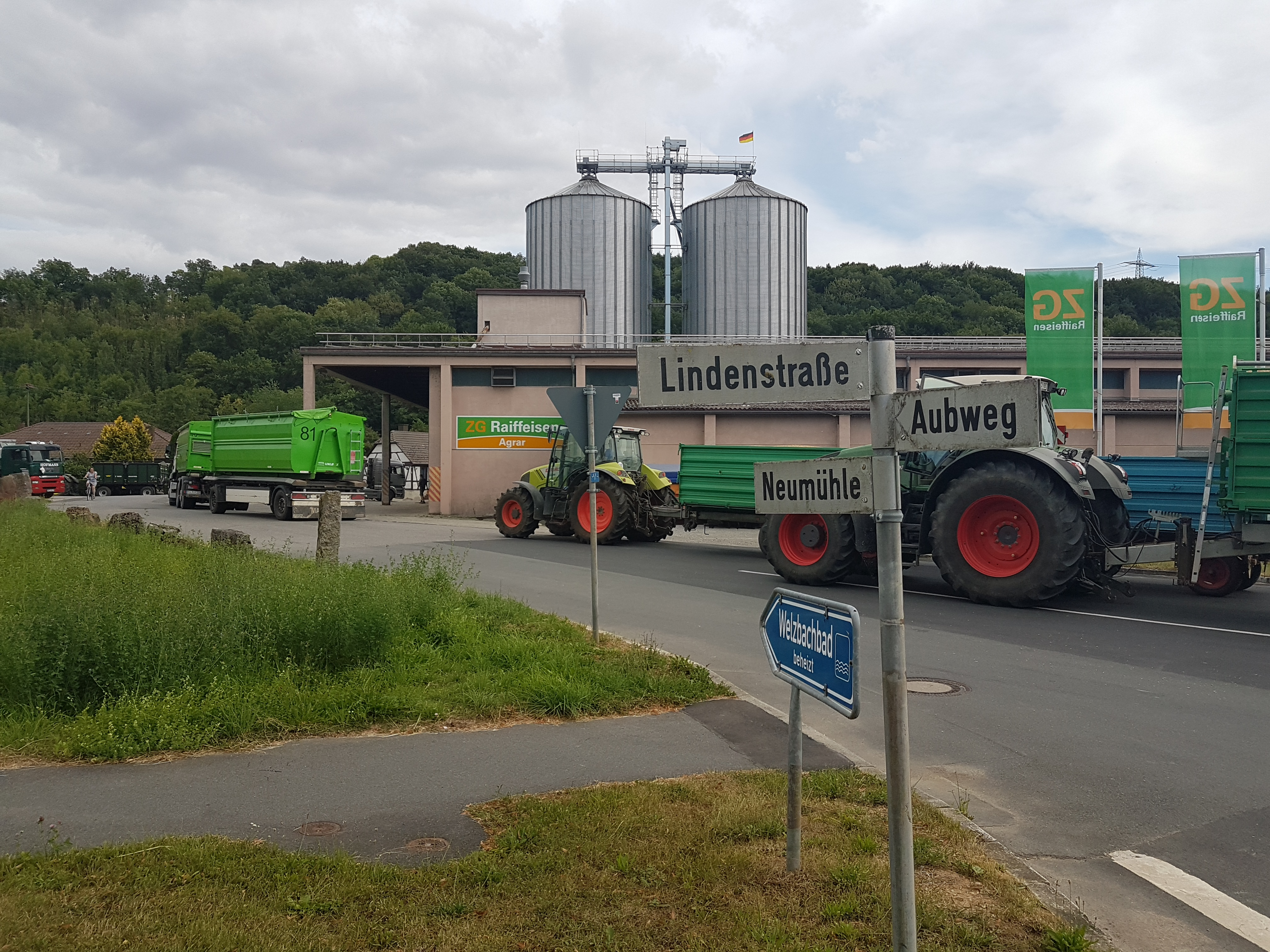 Neumühle bei Werbach-Wenkheim